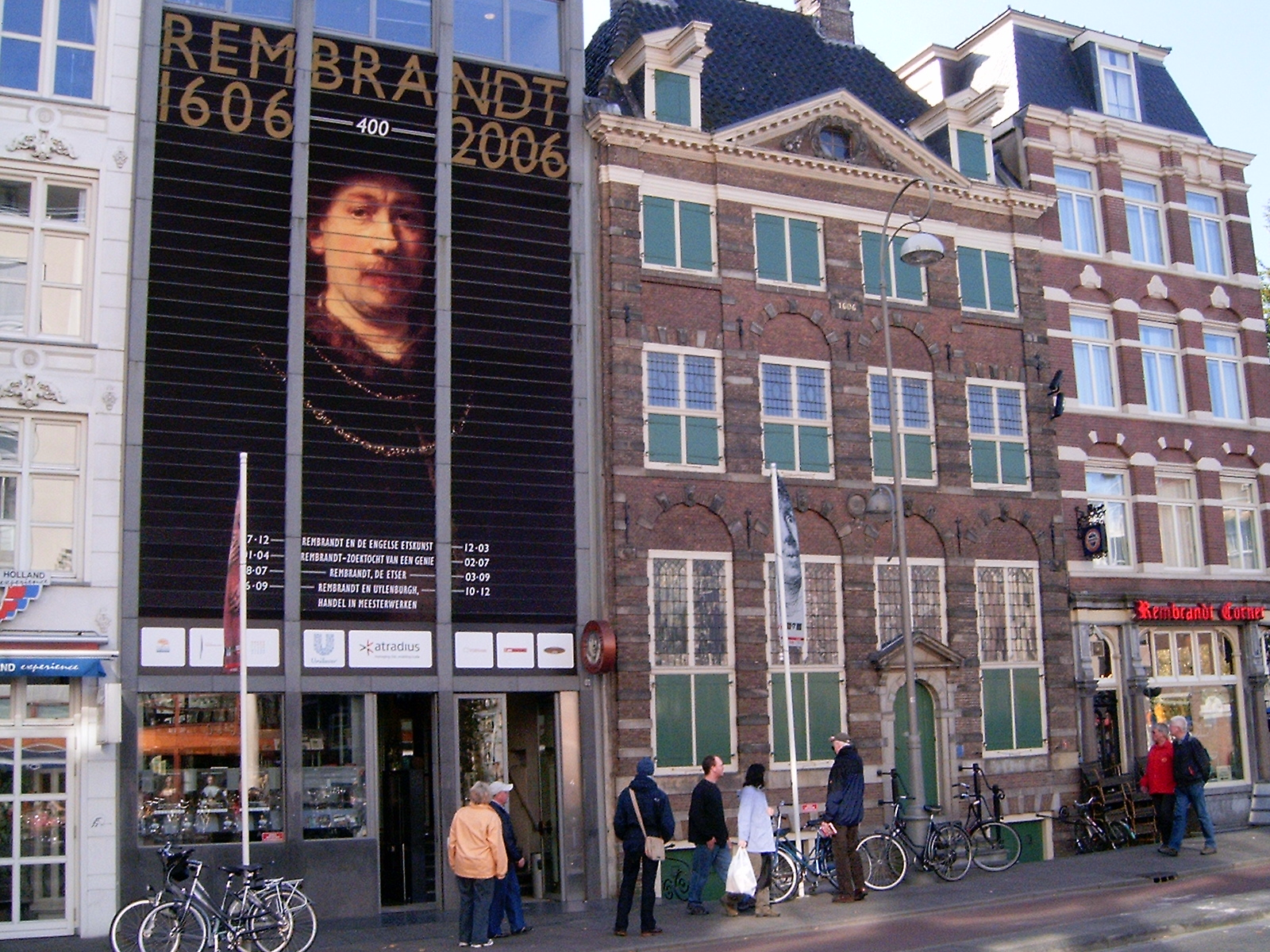 Rembrandthuis